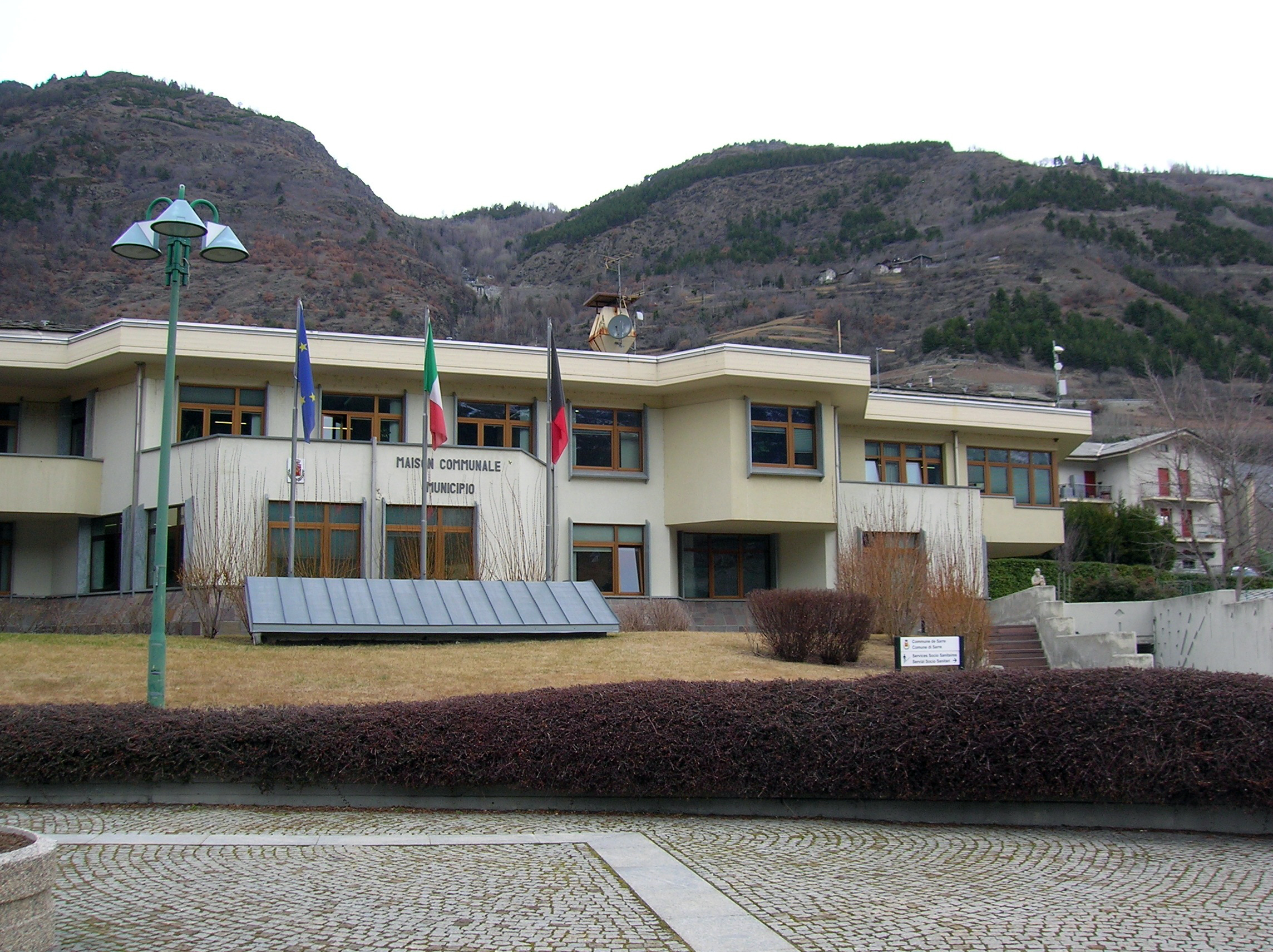 Municipio di Sarre, Valle d'Aosta, Italia.